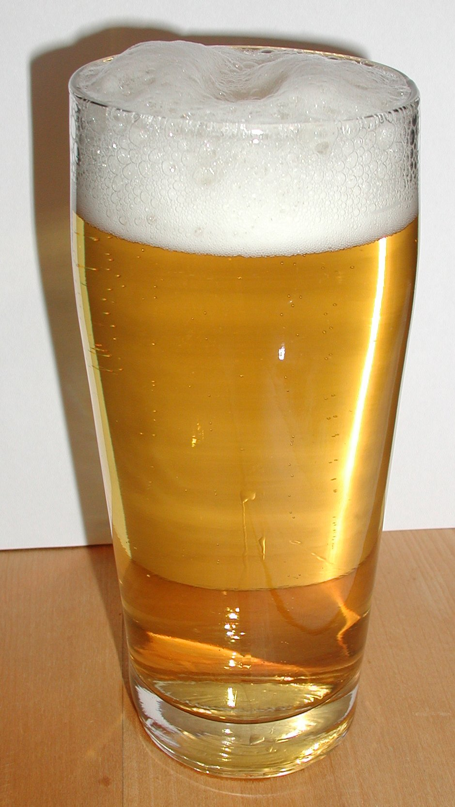 Helles Bier im typischen Glas. Helles (pale beer) in typical glassware.